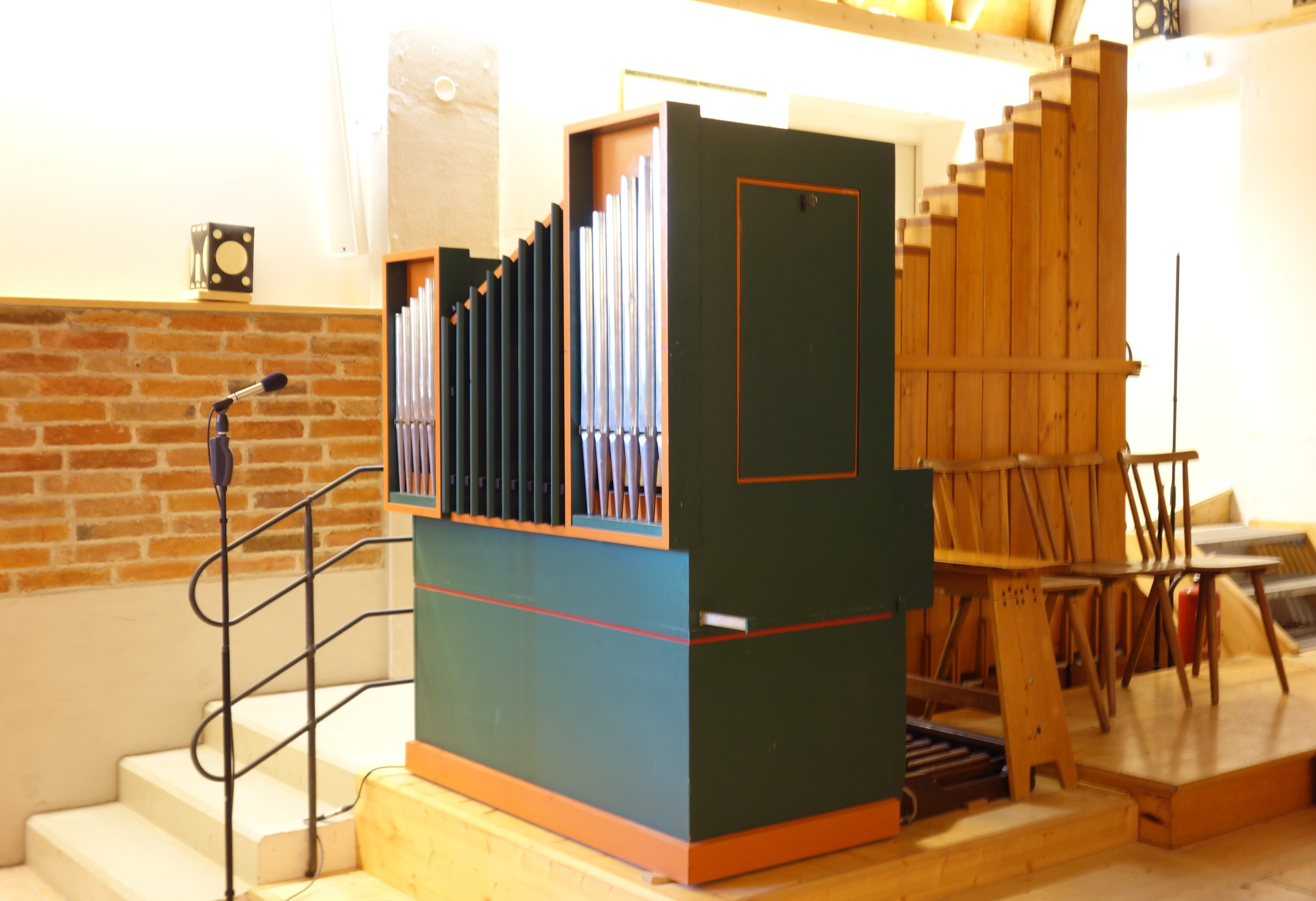 Die Reise-Orgel von Karl Richter im Orgelzentrum Valley (1974, Deininger&Renner, I/8)